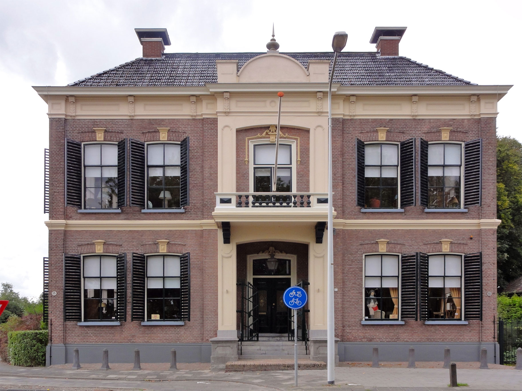 Hoofdweg 46 Damwoude